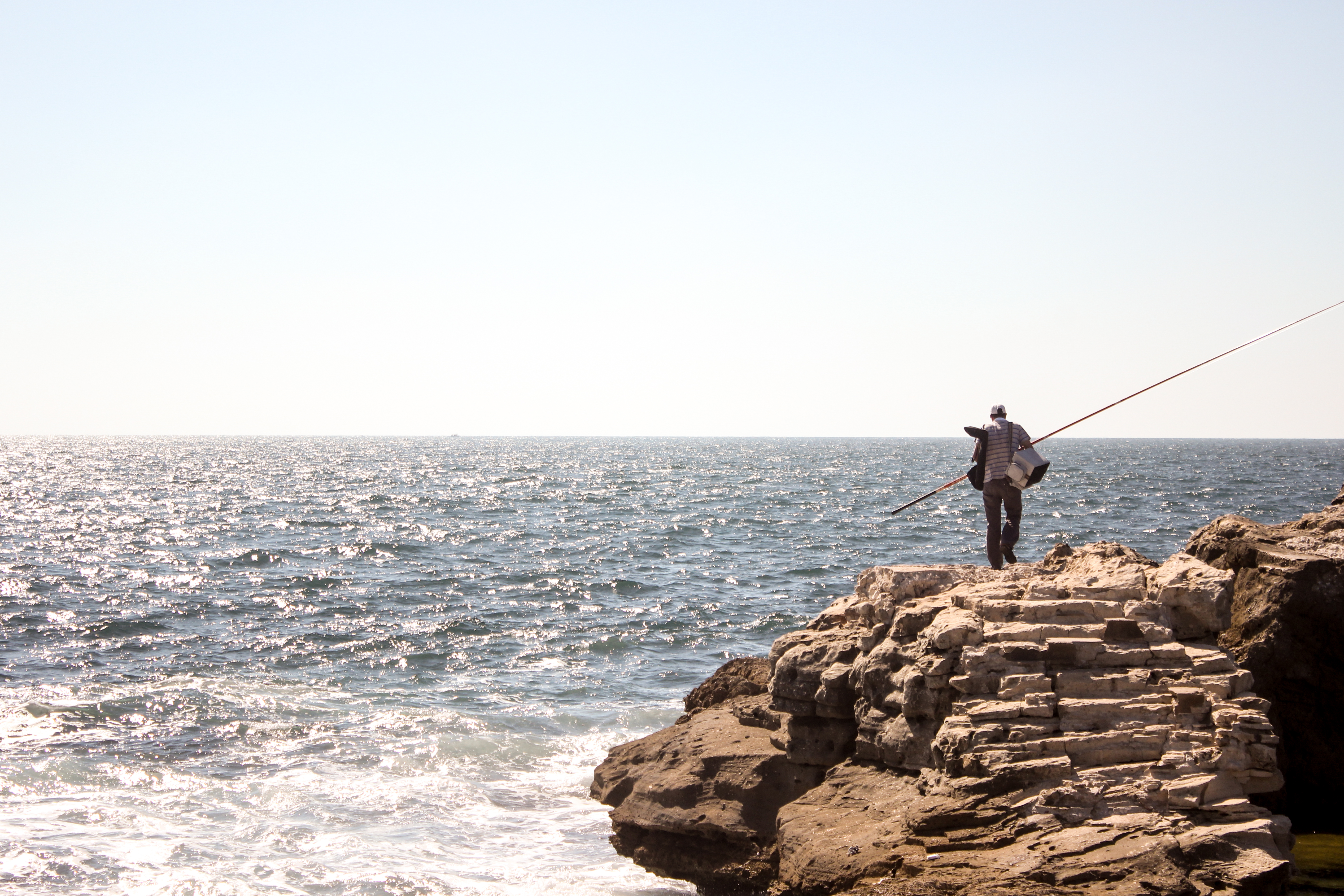 Alexandria Water